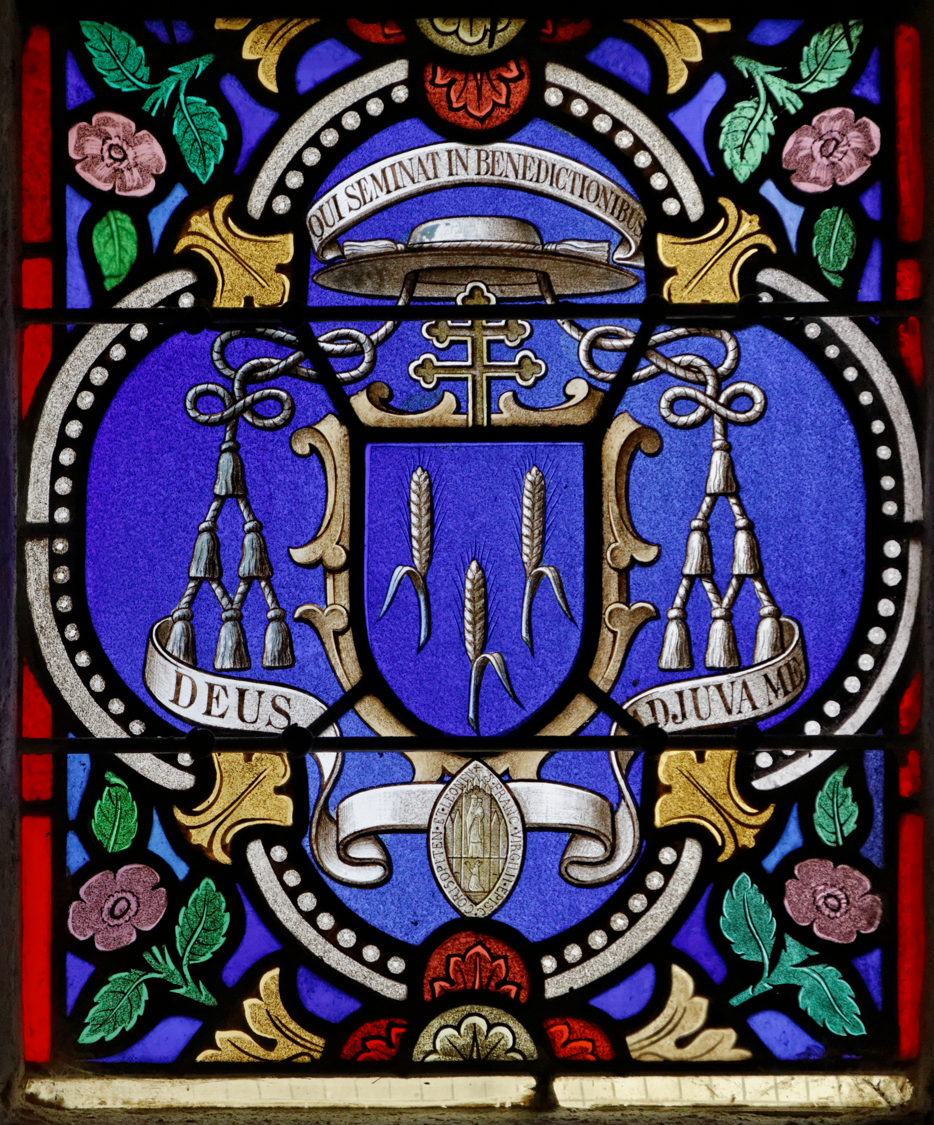 Baie 9 de la cathédrale Saint-Corentin à Quimper dans le Finistère. 4ème lancette, 1er registre. Armes de Mgr François Virgile Dubillard, évêque de Quimper et Léon de 1900 à 1908. D'azur à trois épis d'or. Cri: Deus adjuva me (Dieu, vient à mon aide). Devise Qui seminat in benedictionibus (Qui sème copieusement).